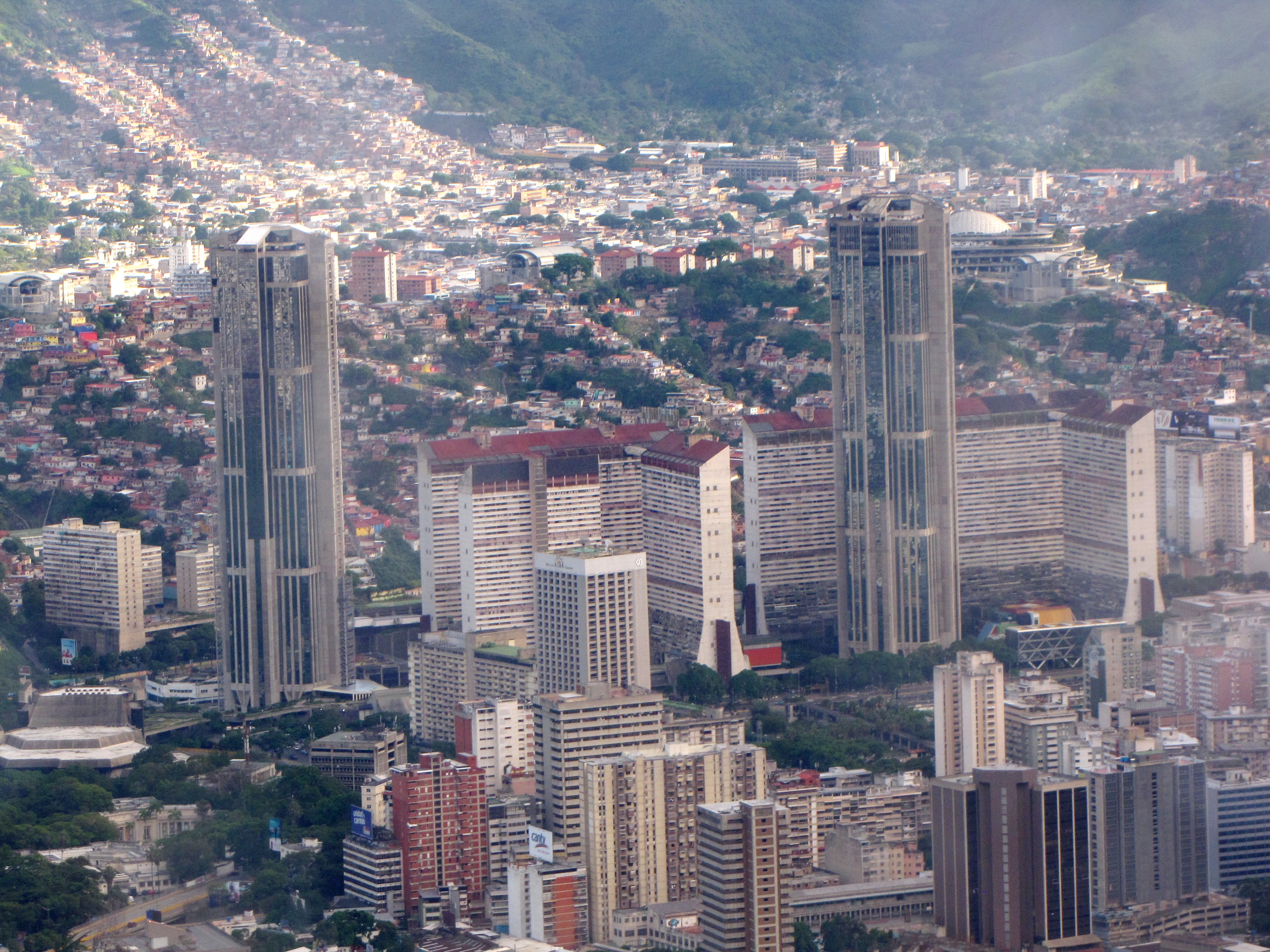 Lieu: Caracas, Venezuela.